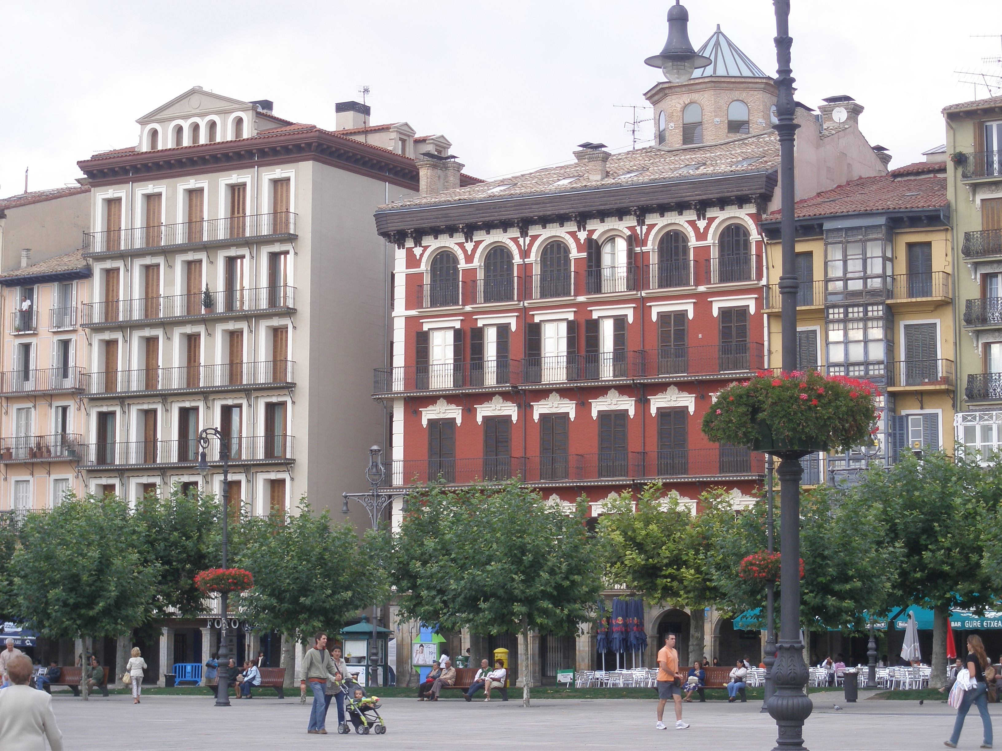 Palacio del siglo XVIII en la Plaza del Castillo